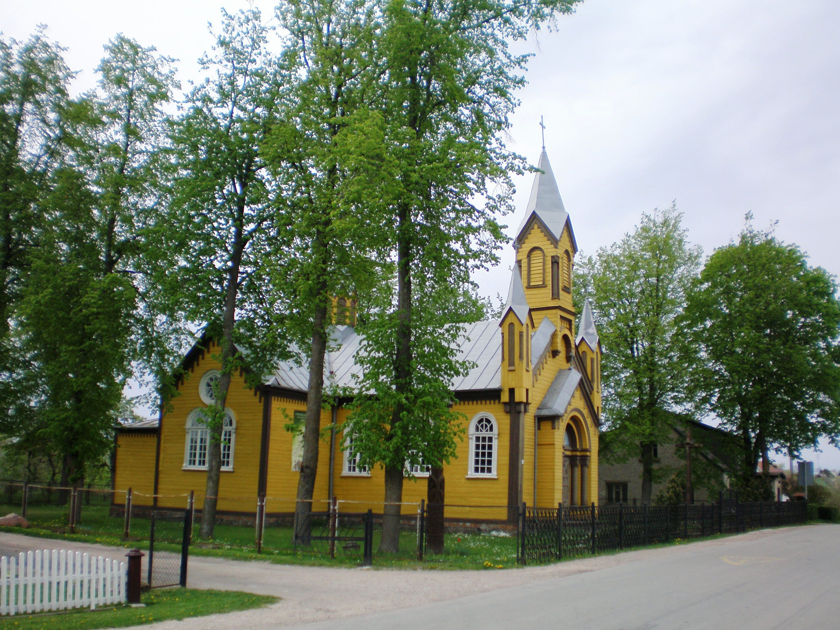 Gudžiūnų banyčia, Kėdainių raj.